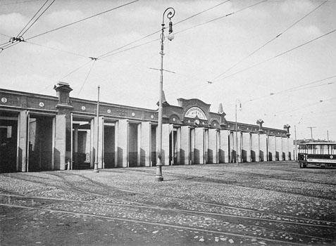 164. Ново-Сокольническiй паркъ город. желЪзныхъ дорогъ. Вагонные сараи. (Москва - Русаковское депо)